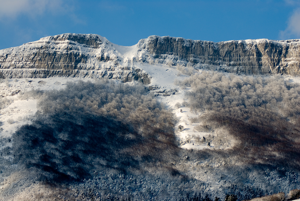 Salbada mendilerroaren neguko ikuspegia.